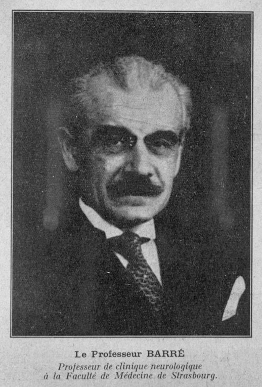 Réf. image : 05312 Le professeur Barré, professeur de clinique neurologique à la Faculté de Médecine de Strasbourg 20e siècle Ouvrage : La vie médicale Edition : Paris: [s.n.], 1933 Cote : 111761 Empl. de l'image : n° 18 p. 809 Technique : Impr. photomécanique - Héliogravure Adresse permanente de cette image